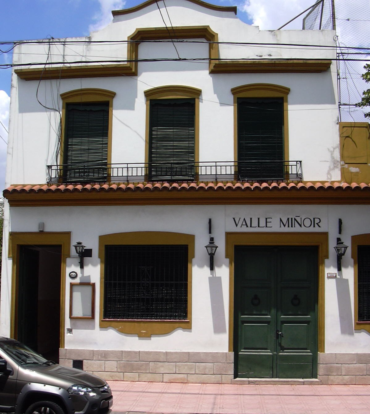 El Círculo Social "Valle Miñor" de Galicia en Buenos Aires visto desde el norte